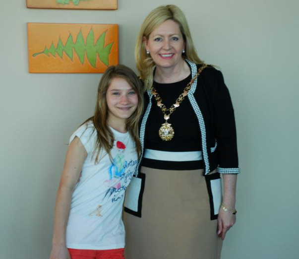 Lisa Scaffidi empfängt deutsche Schülerin